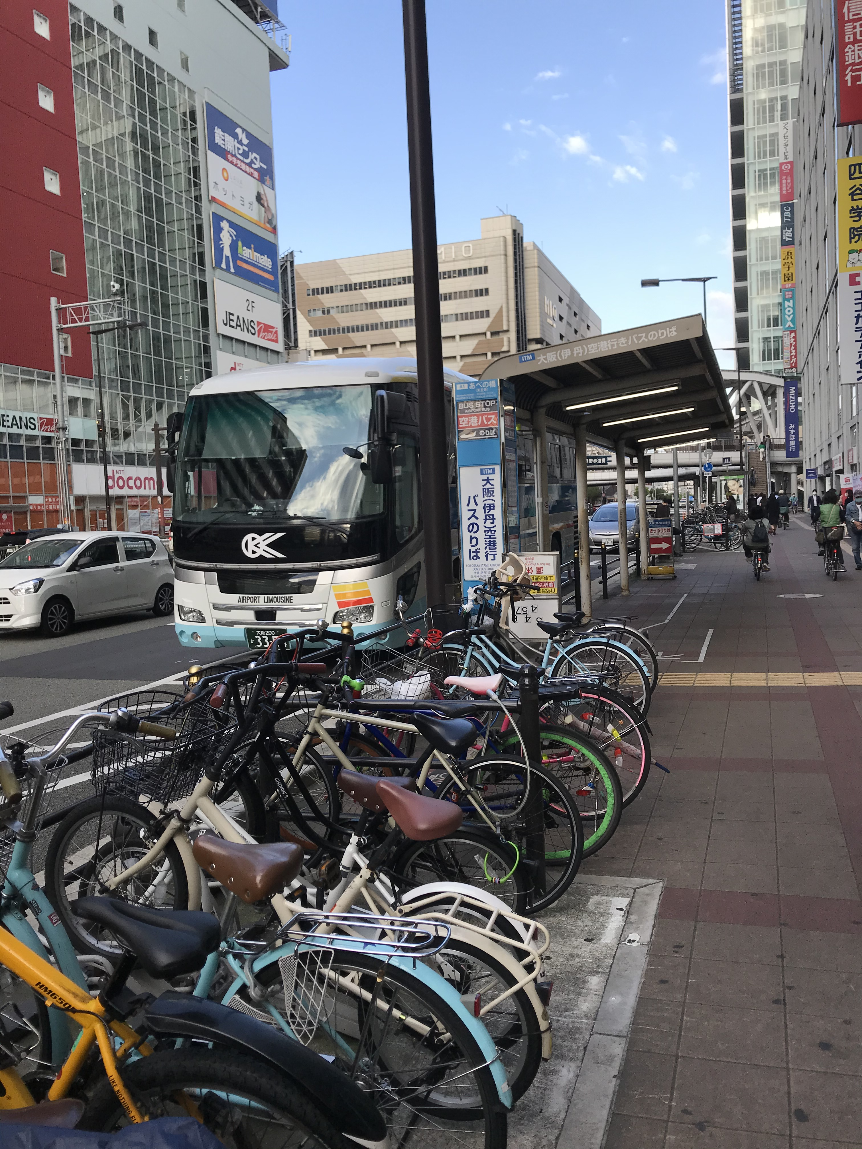 行先の表示がされておらず、利用者も待っていない。